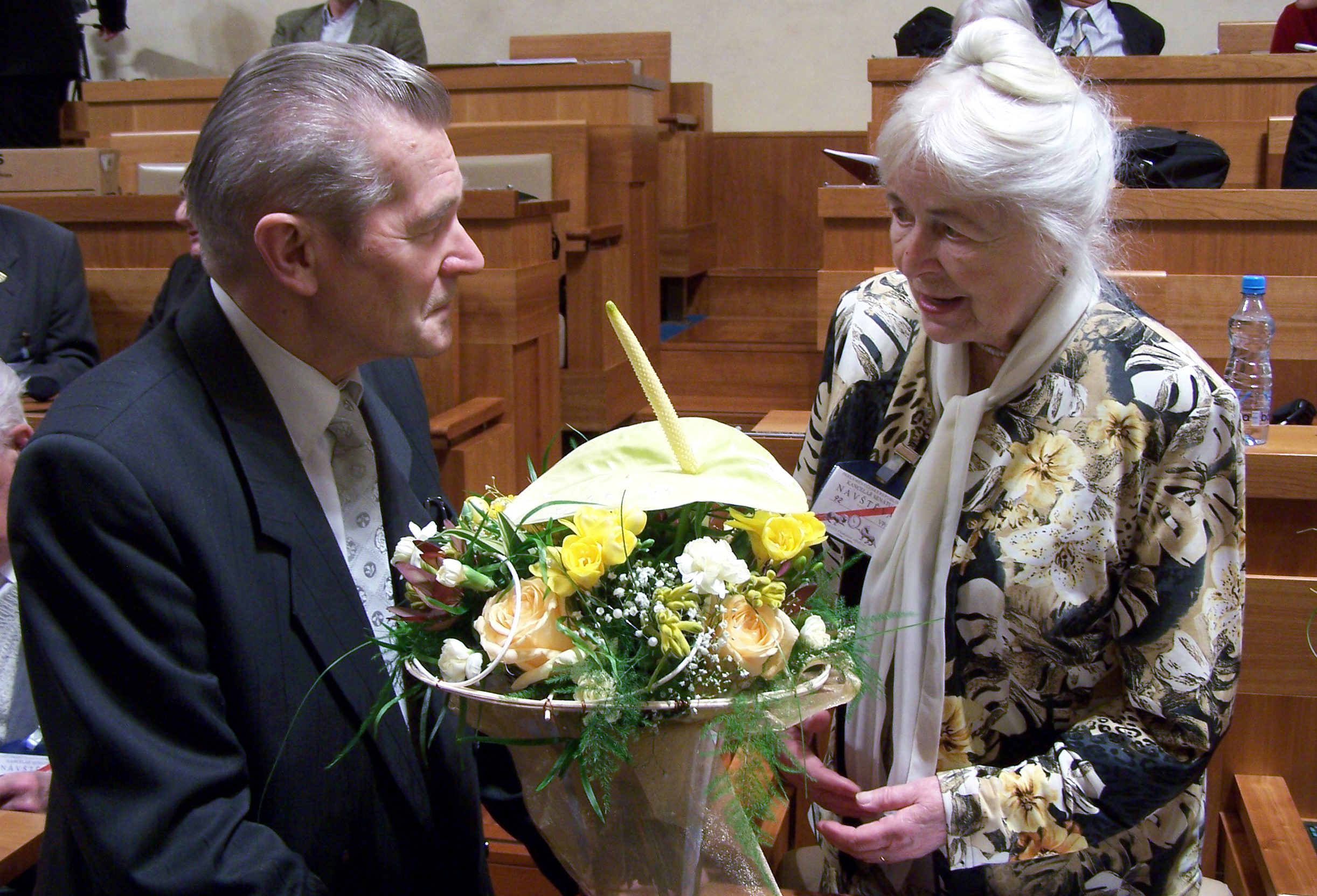 Naděžda Kavalírová, předsedkyně KPV ČR a Leo Žídek, místopředseda Konfederace politických vězňů v Senátu ČR během festivalu Mene Tekel. Foto vzniklo pro web: Političtí vězni.cz